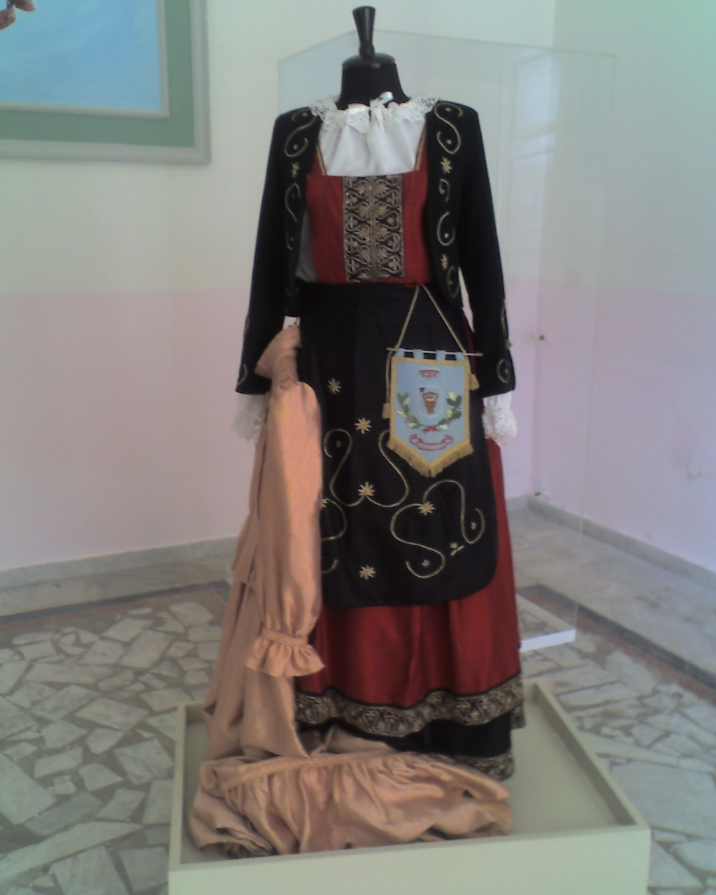 Abito tipico di Marcedusa (Cz)